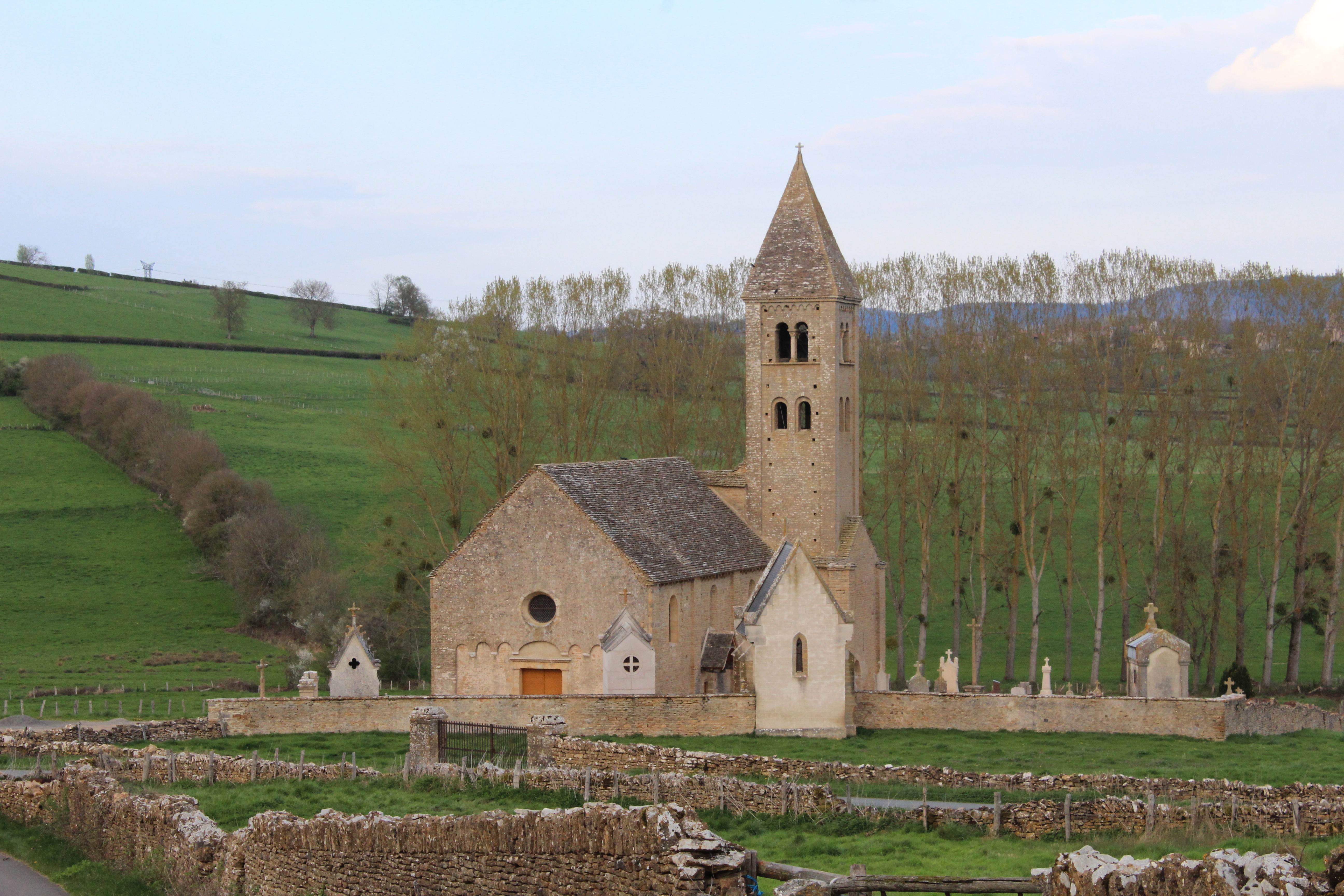 Église Saint-Blaise de Mazille.